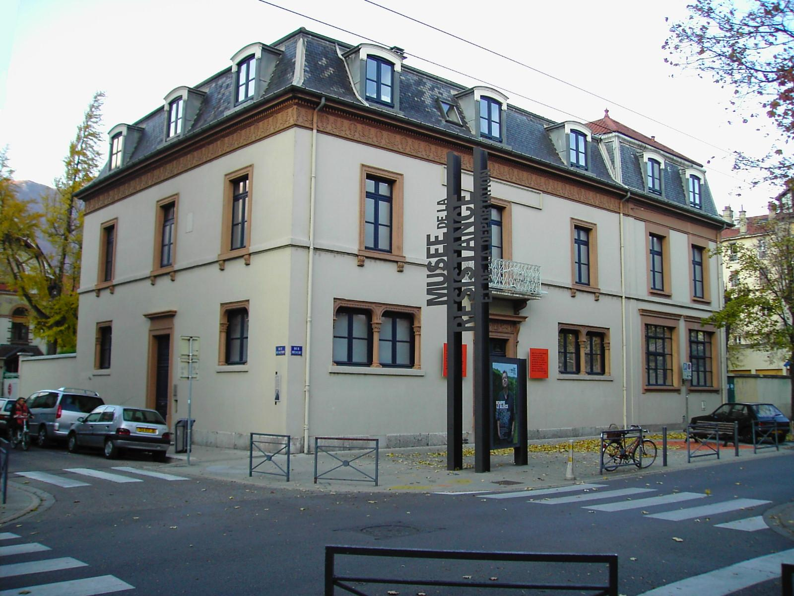 musée de la résistance et de la déportation, rue Hébert - Grenoble